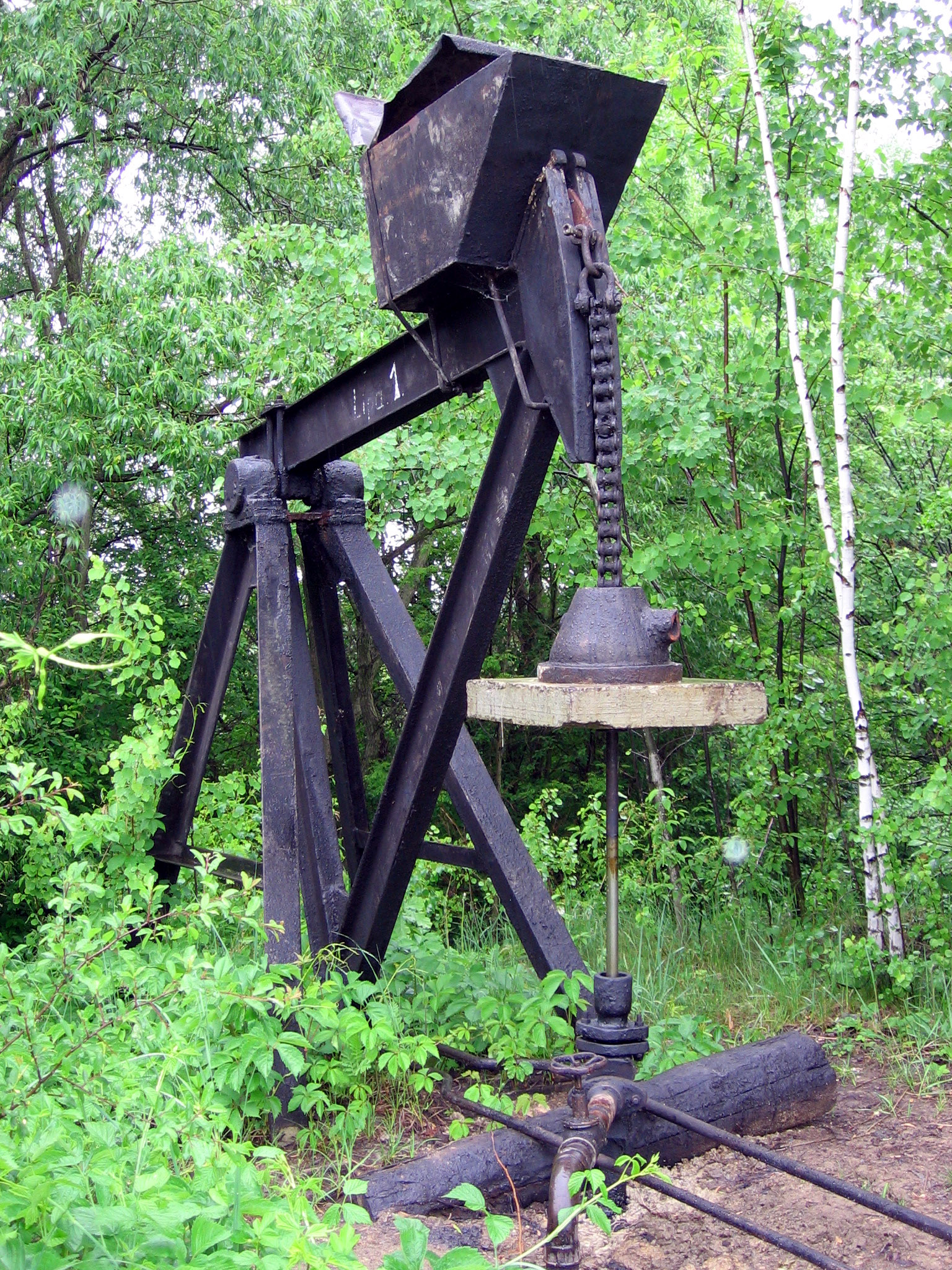 najstarszy szyb naftowy w Lipinkach "Dziadek"